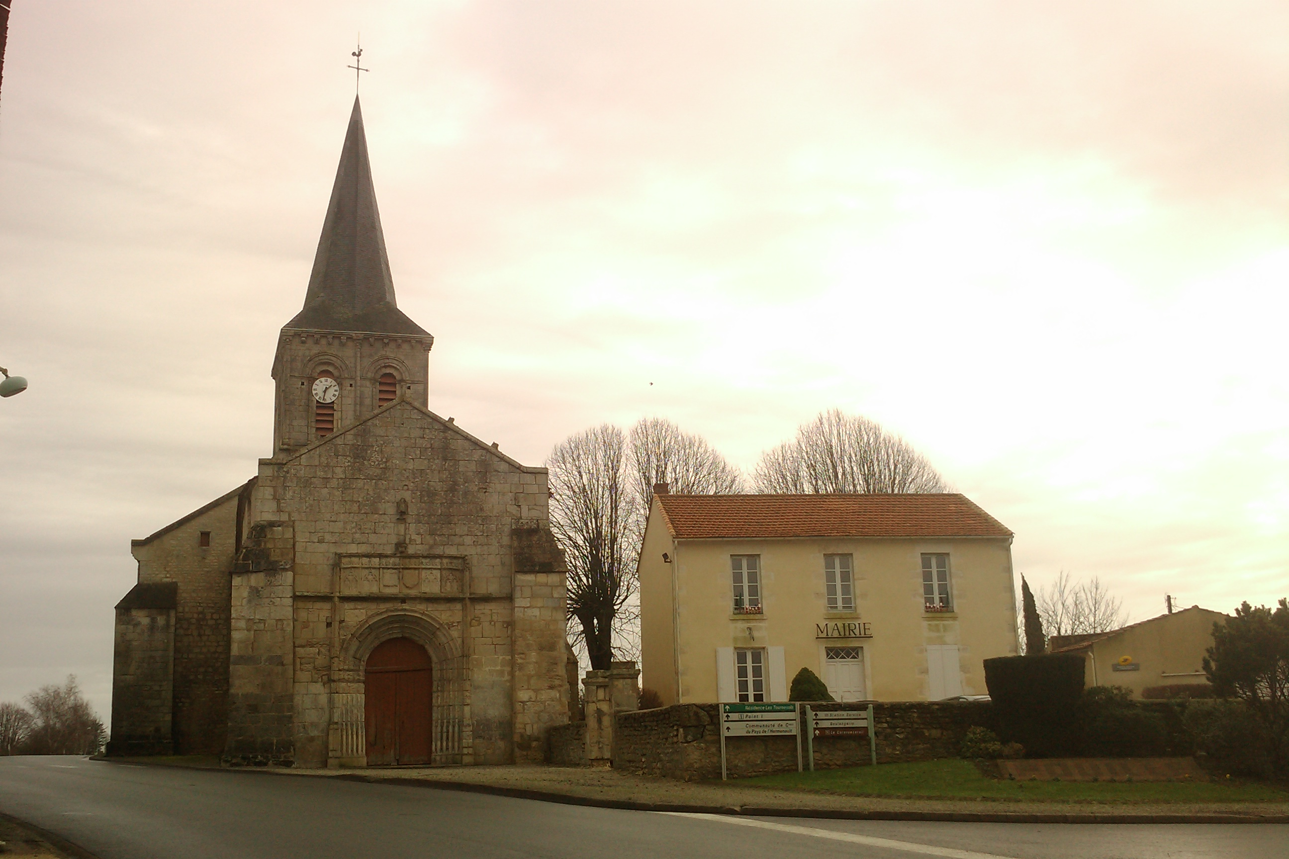 Église Saint-Rémi de Pouillé